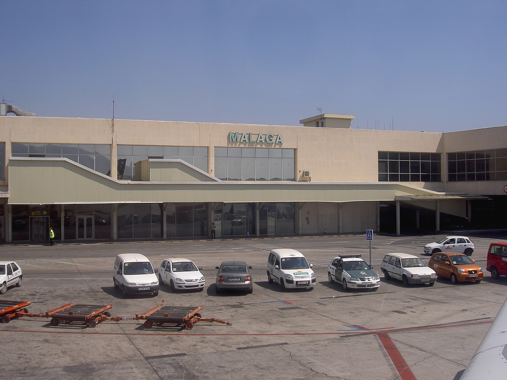 Aeropuerto de Málaga